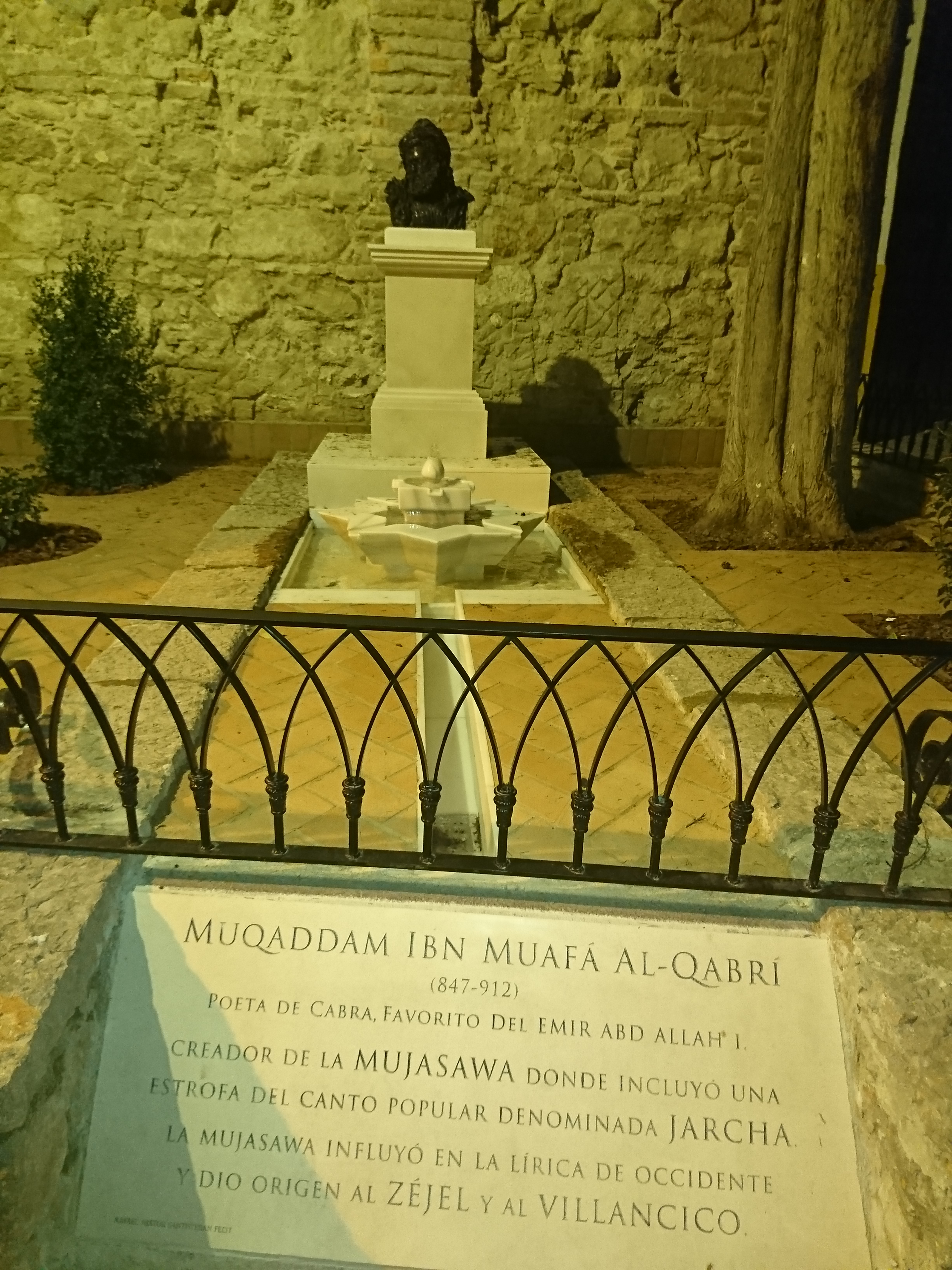 Monumento a dicho poeta